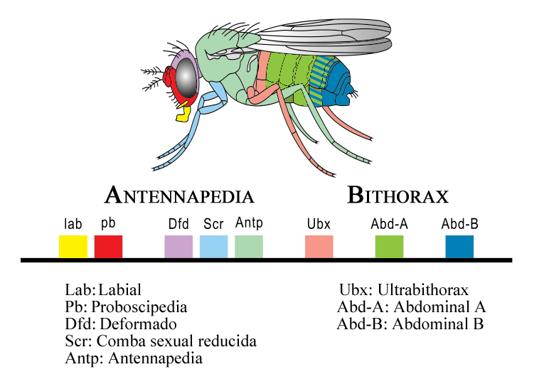 Complejos homeóticos en Drosophila melanogaster y genes que contienen.